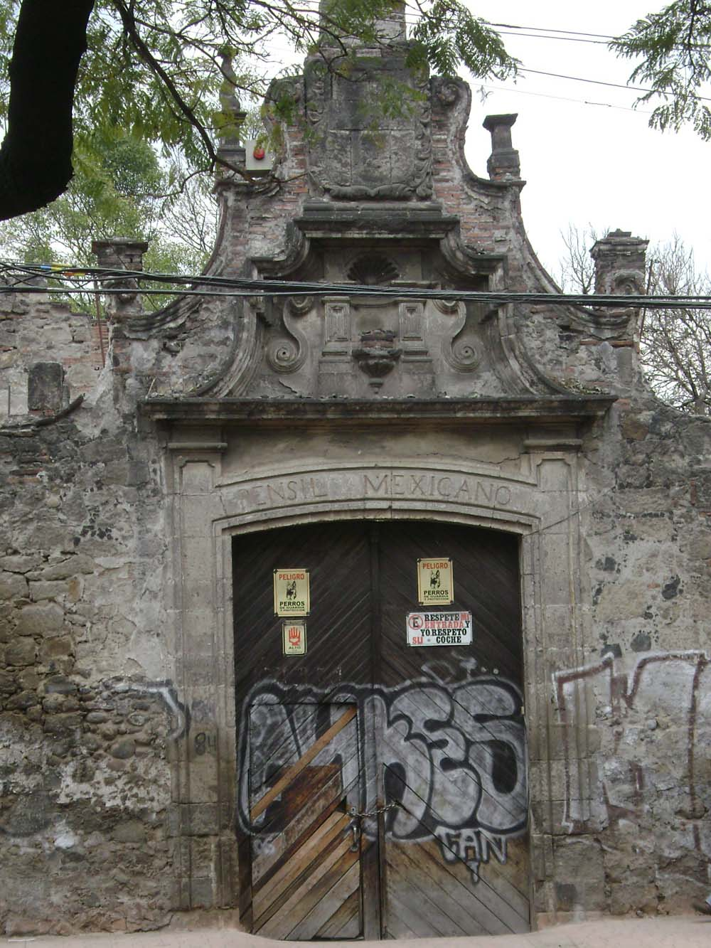 Aspecto del Portal del Pensil Mexicano sobre la calle Lago Chiem, en la Ciudad de México